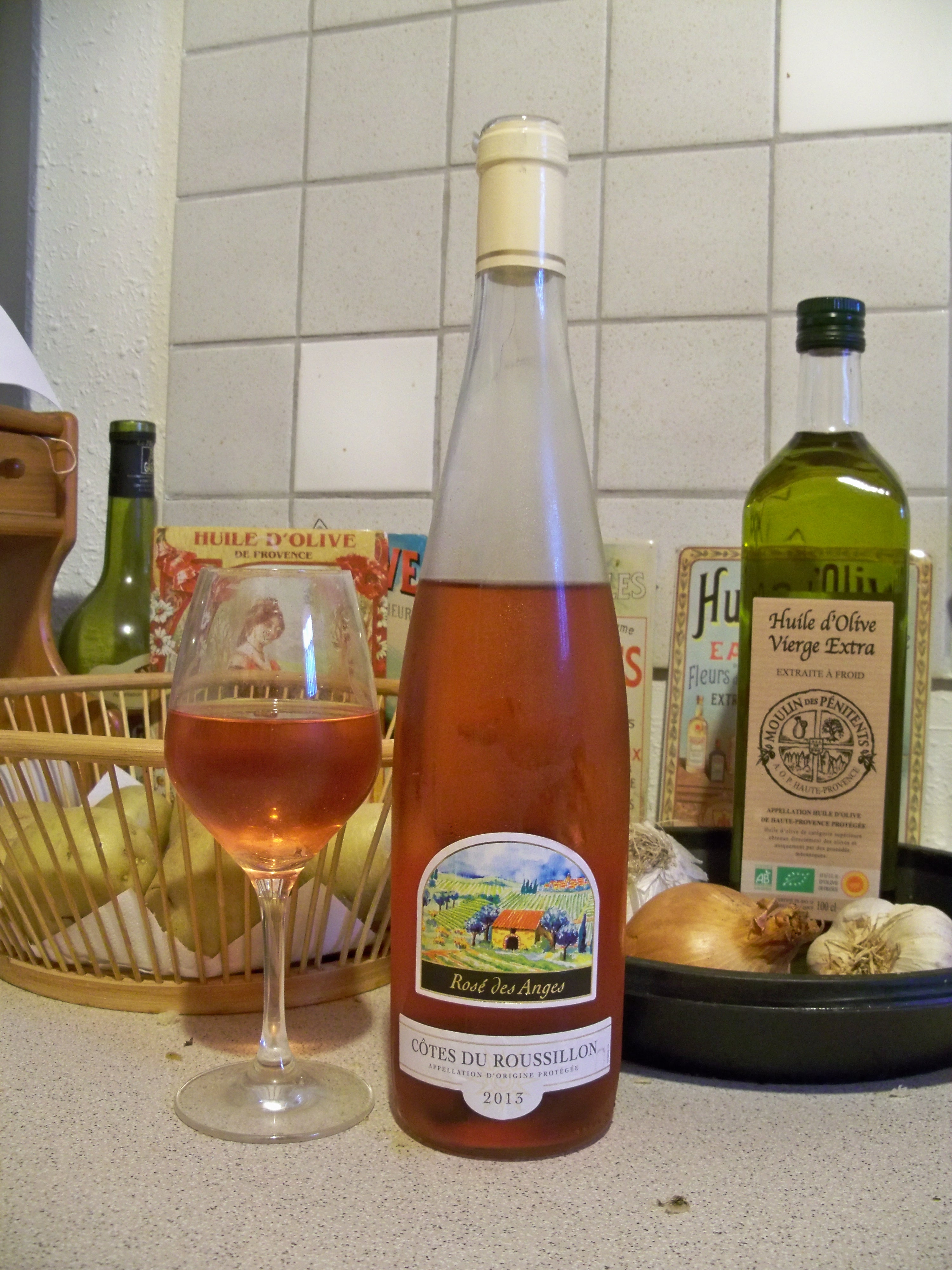 bouteille de Rosé des Anges rosé